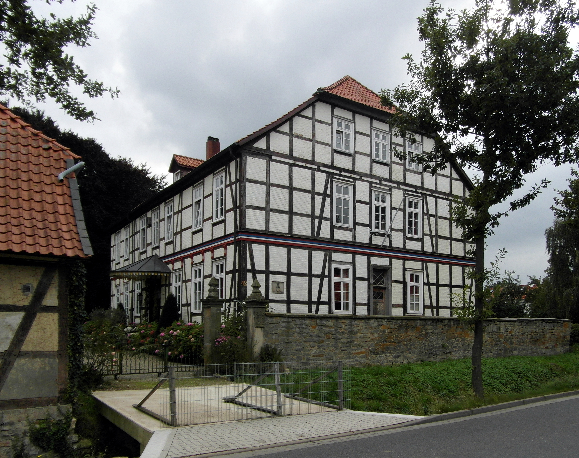 Wohnhaus des Gut (genannt Gut III) Hannoversche Straße 42 im Springer Stadtteil Gestorf.